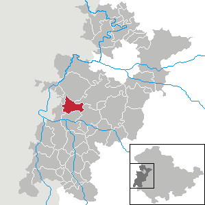 Frauensee in Thuringia - Wartburgkreis